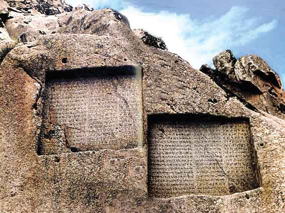 Ganj Nameh Inskriptionen